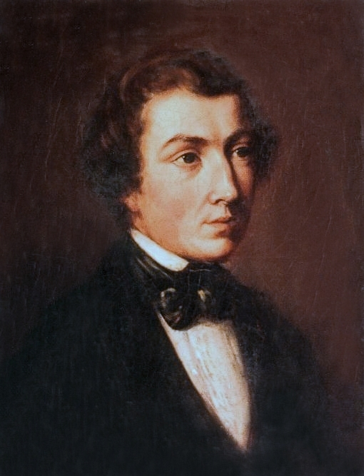 Photographie numérisée d'un portait d'André Sodar peint par son frère, le portraitiste François Sodar.